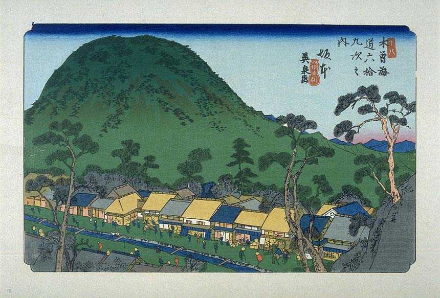 Sakamoto on the Kisokaido, ukiyo-e prints by Keisai Eisen